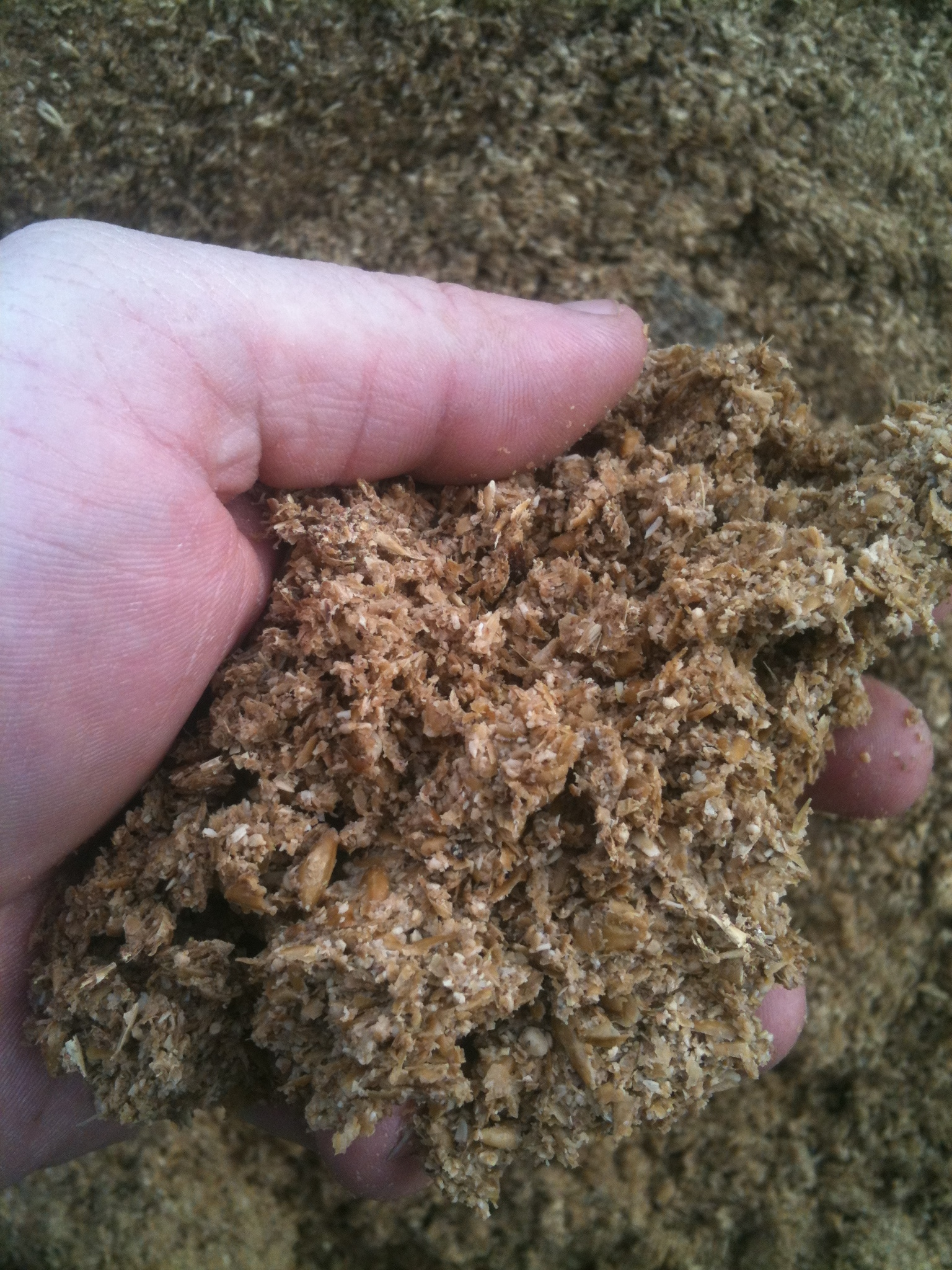 Biertrebersilage für Milchkühe, Reststoff der Bierbrauerei